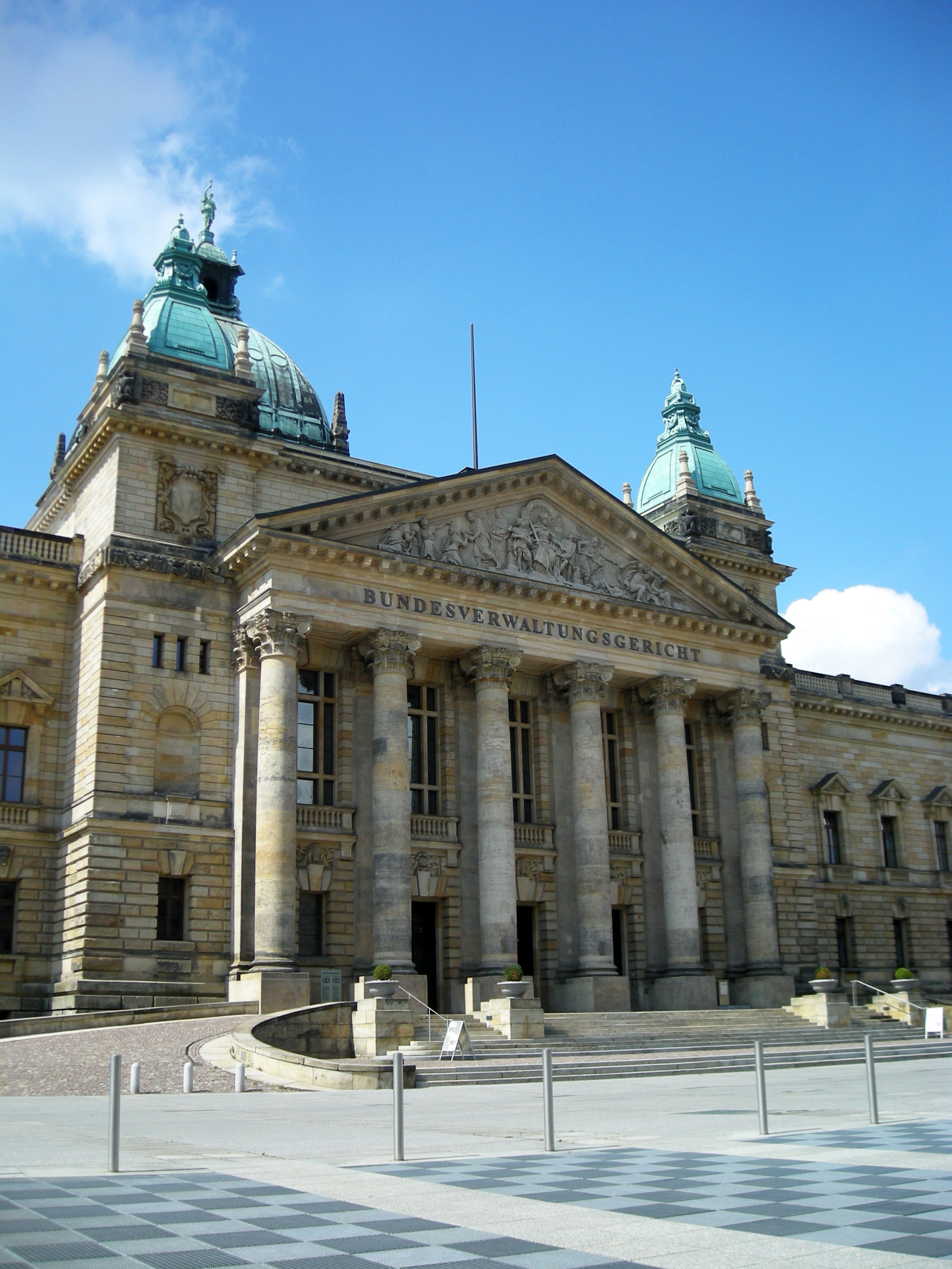 Reichsgerichtsgebäude in Leipzig, From 2007 trip